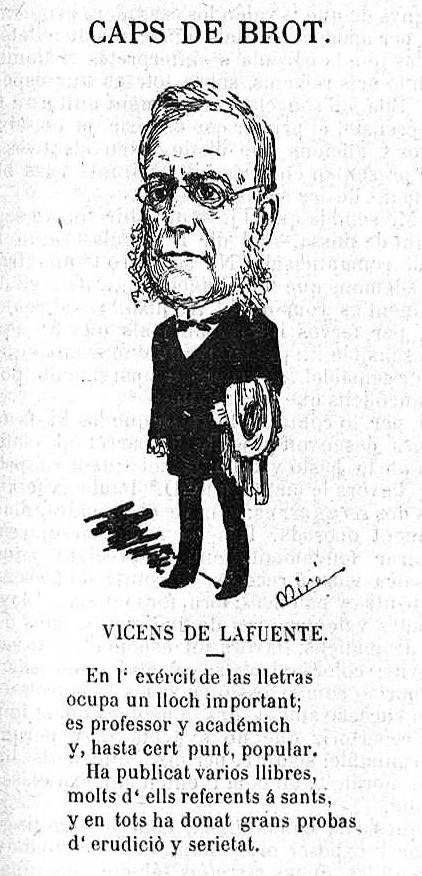 Vicente de la Fuente.